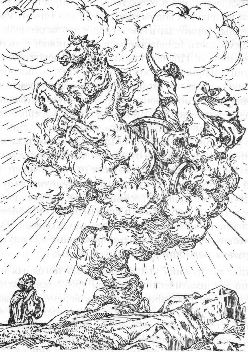 Tornado on the antique engravings: Elijah the Prophet spins a vortex (Смерч на старинной гравюре: Илья Пророк раскручивает вихрь)